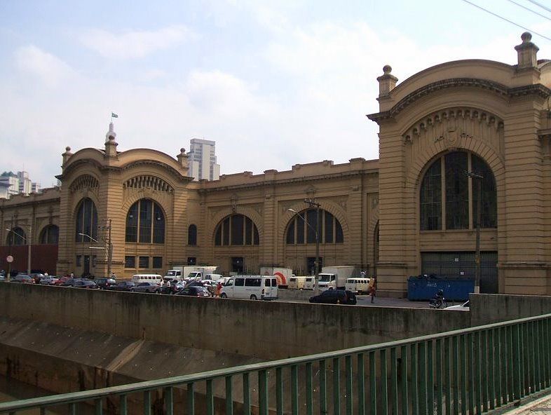 Vista do Mercado Municipal Paulistano, a partir da Avenida do Estado. São Paulo, Brasil.